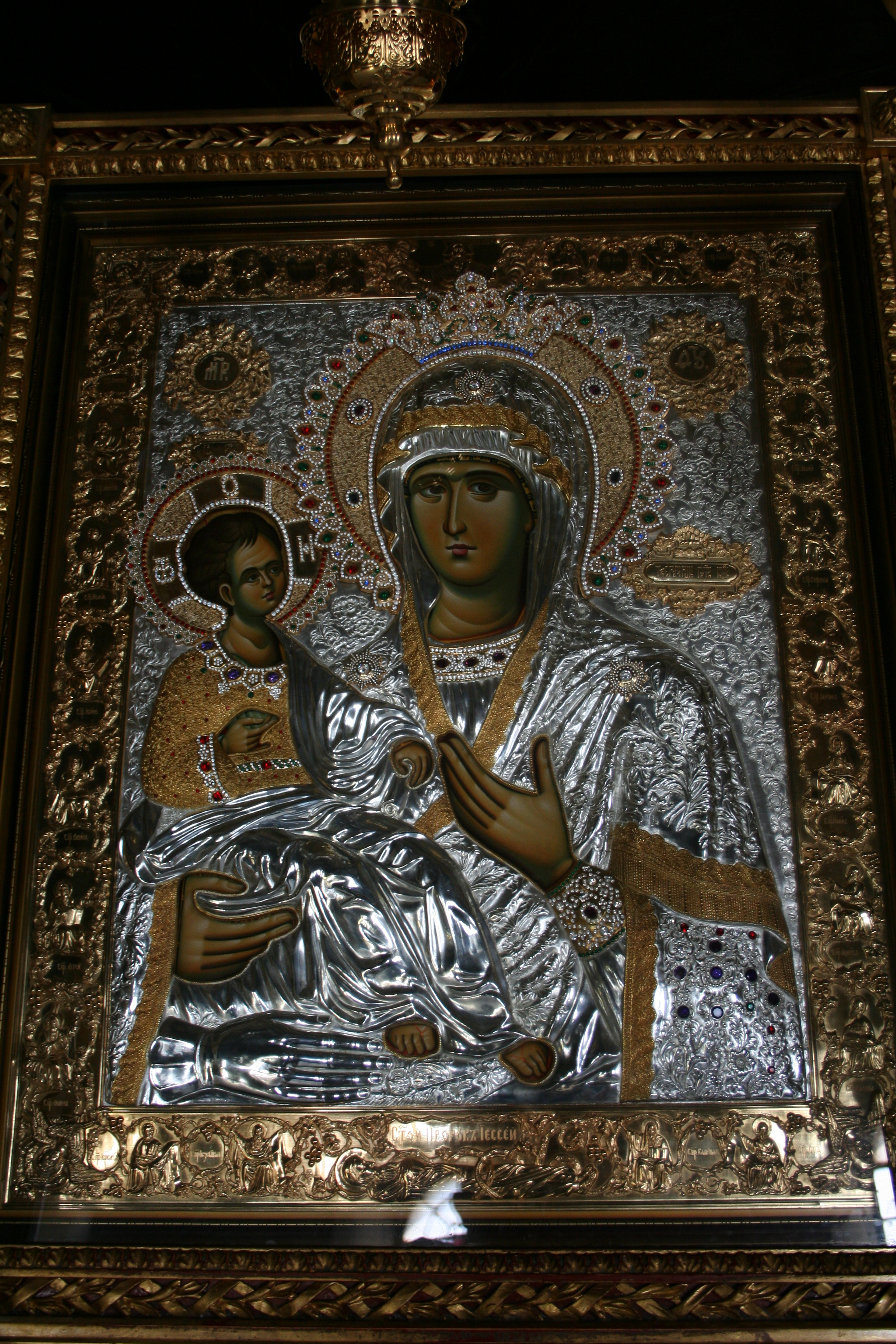 Saborna crkva Sv. Petra i Pavla, Šabac-Ikona Bogorodica Trojeručica